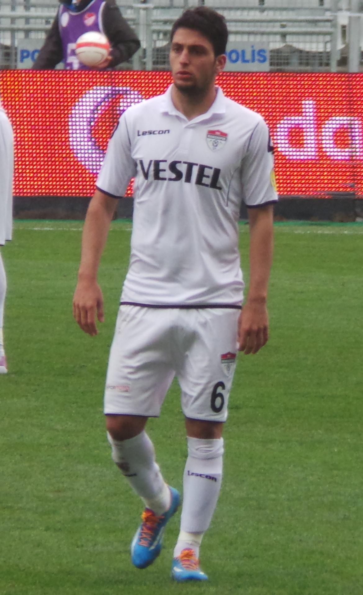 Bülent Cevahir